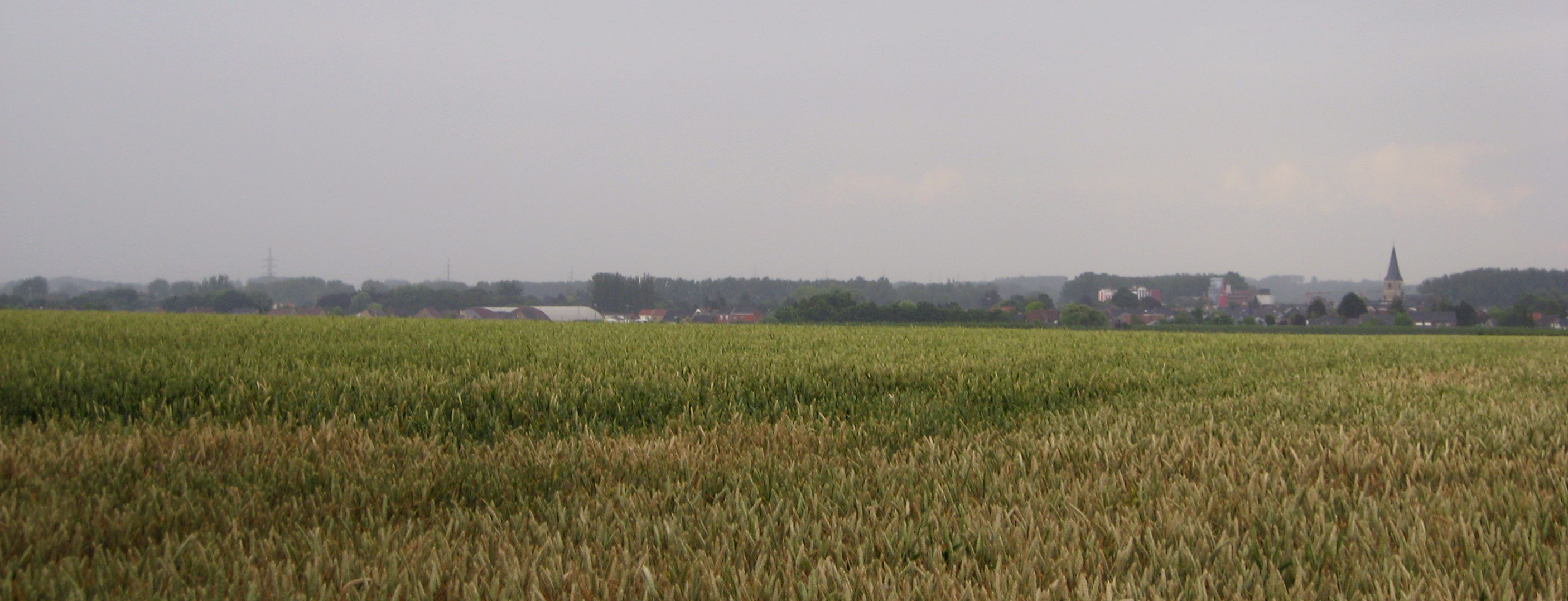 Panoramisch zicht op Alken Centrum.